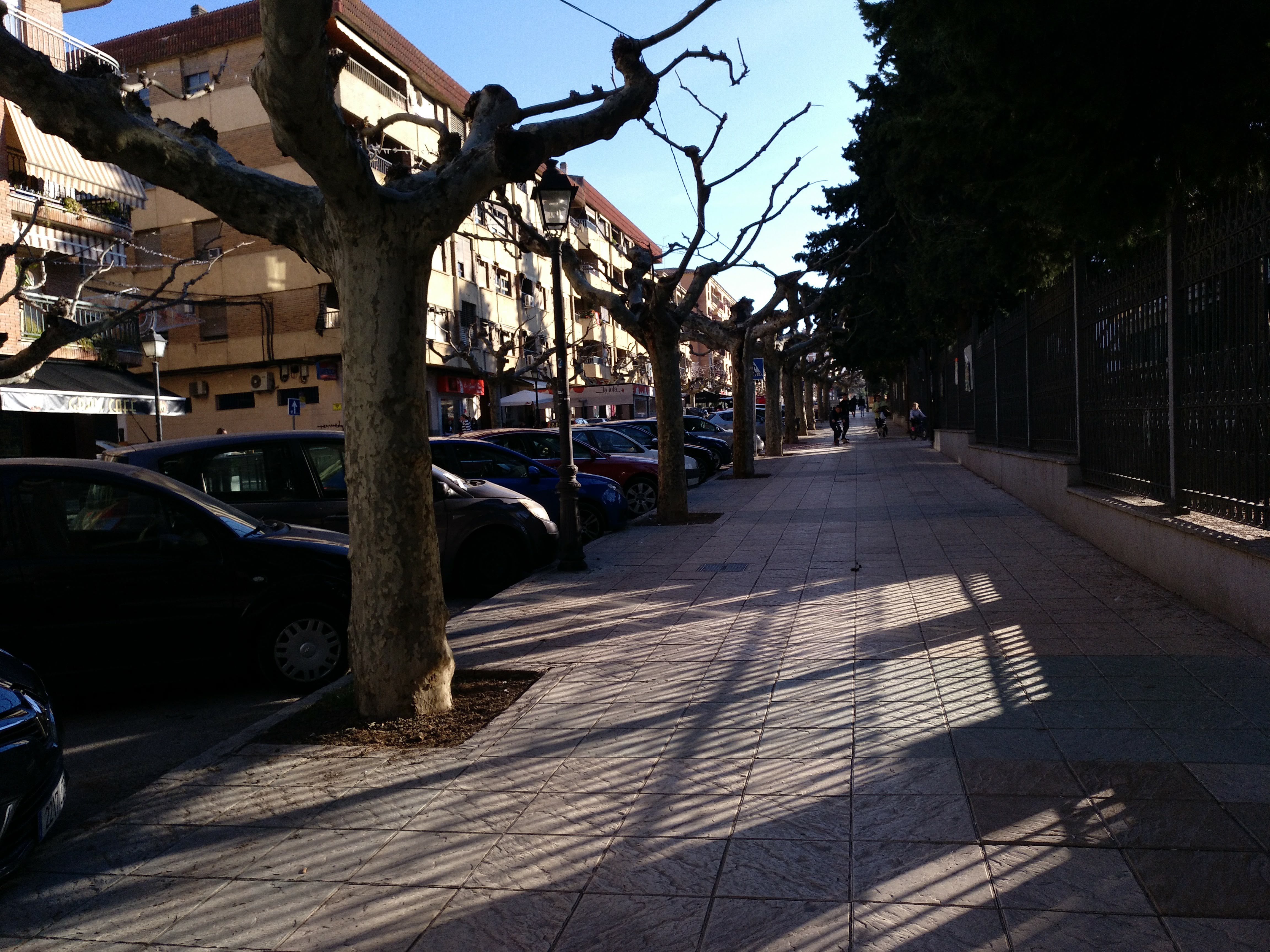 Av. Pierre Cibié de Martos, Jaén (España).